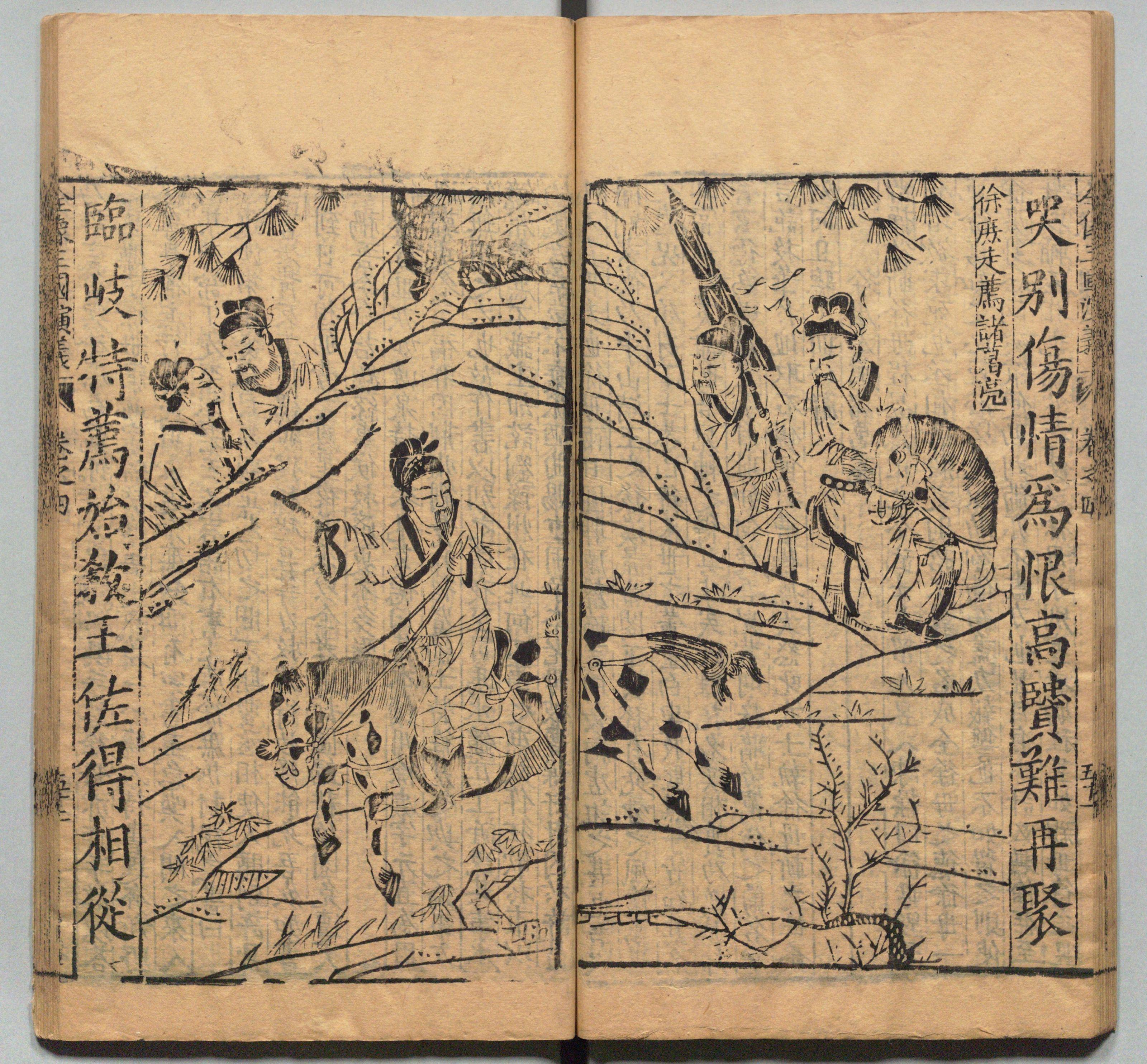 新刊校正古本大字音释三国志通俗演义 明万历十九年书林周曰校刊本